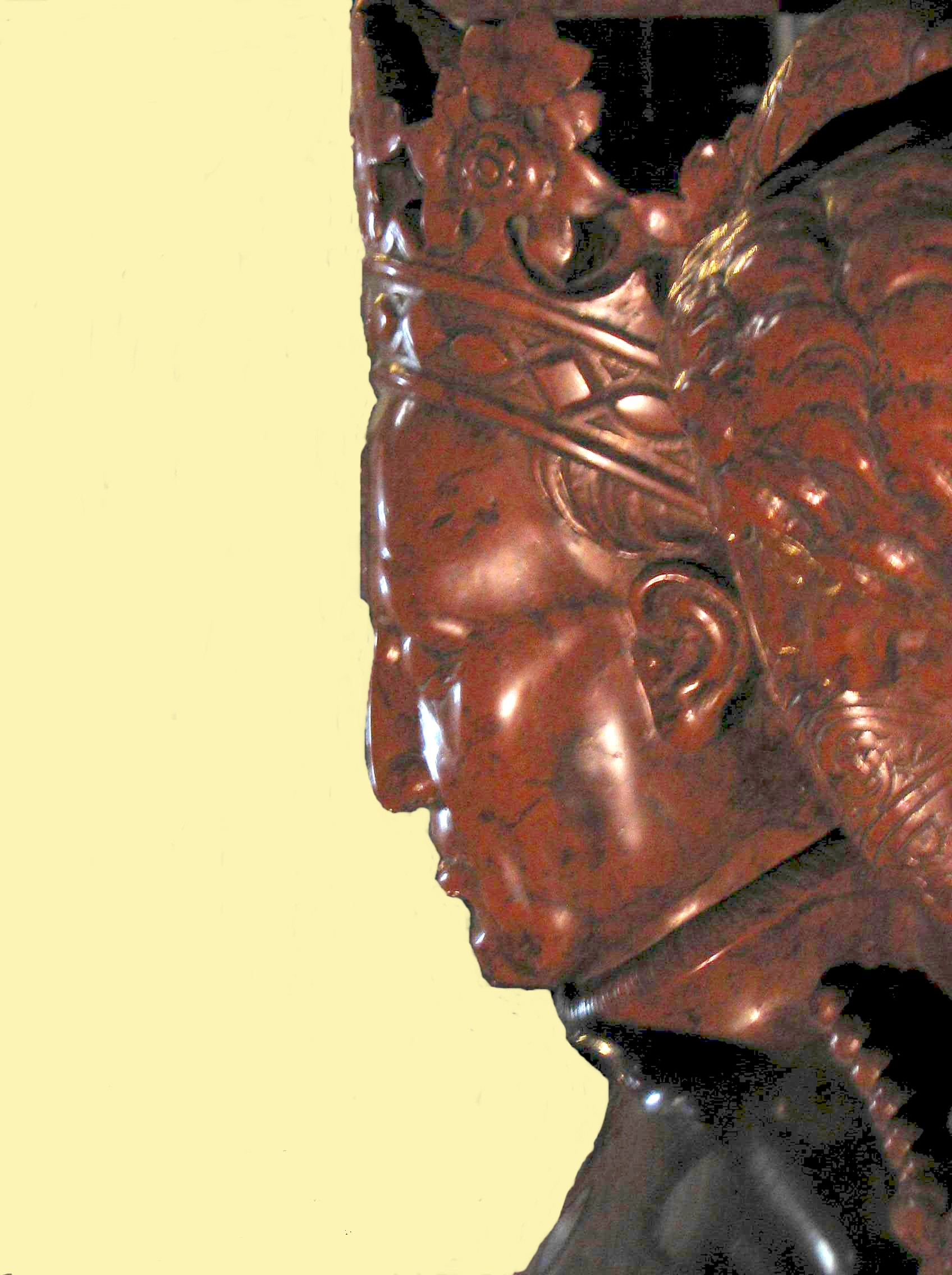 Władysław Jagiełło from tomb effigy in Kraków author-Maciej Szczepańczyk user:Mathiasrex